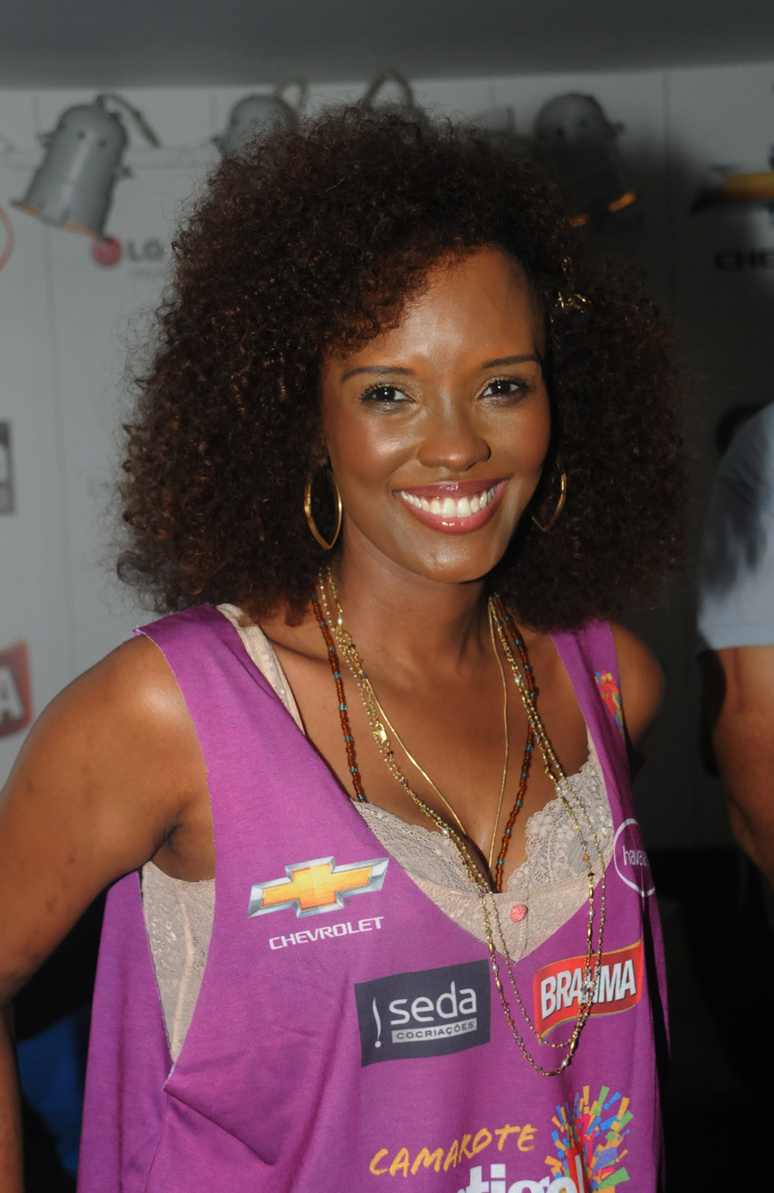 Atriz Isabel Fillardis em Salvador em 2012.